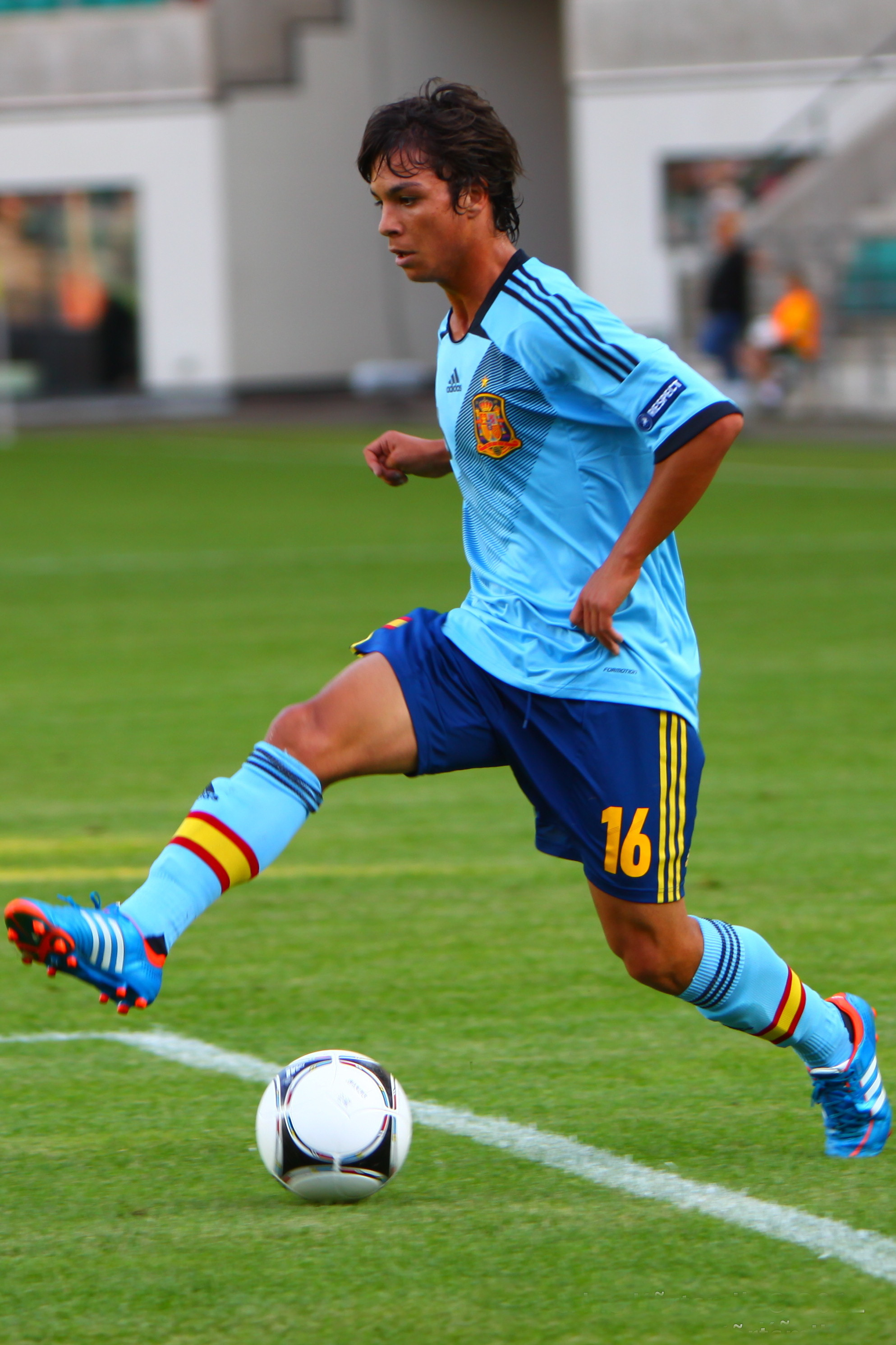 U-19 Portugal vs Spain.